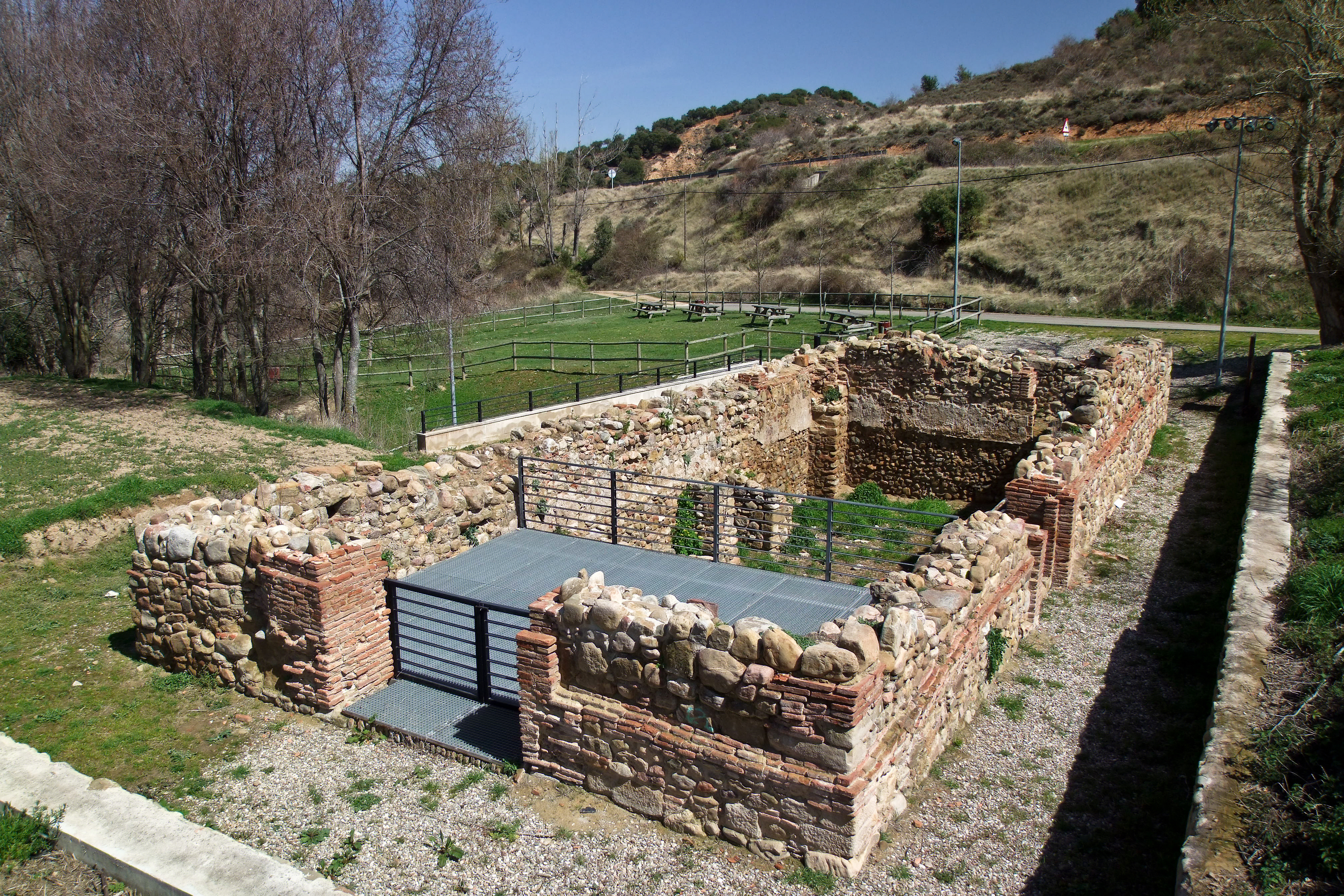 Restos de la ermita de San Bartolomé en la localidad de La Villa de Ocón, La Rioja - España